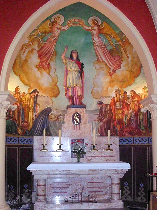 Autel de Saint Symphorien dans l'église paroissiale de Deûlémont